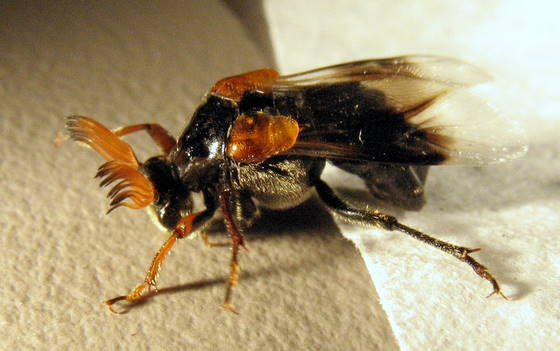 Ripiphorus diadasiae, male, from W Los Angeles Co., CA, USA